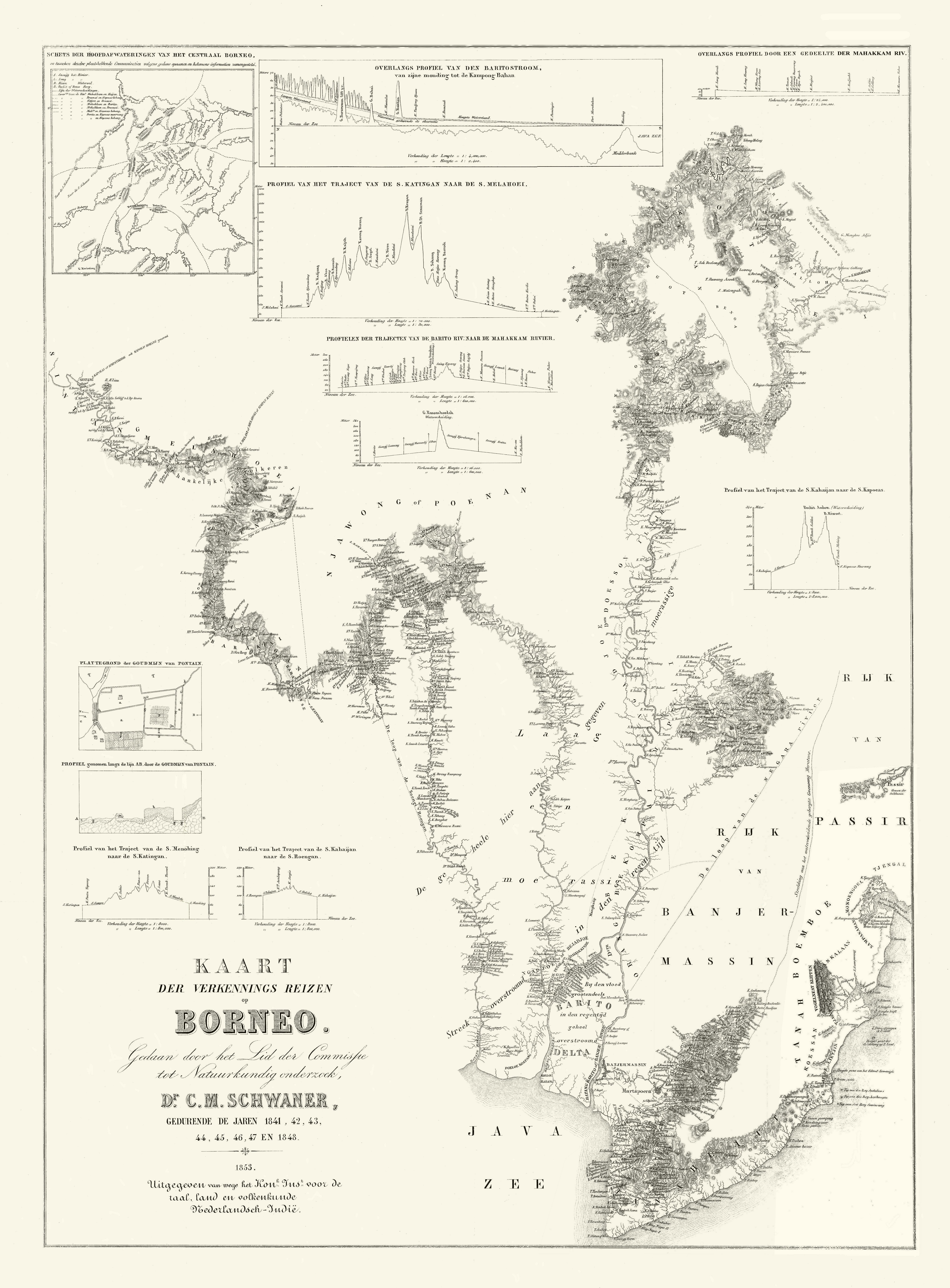 Schwaners Borneo-Karte